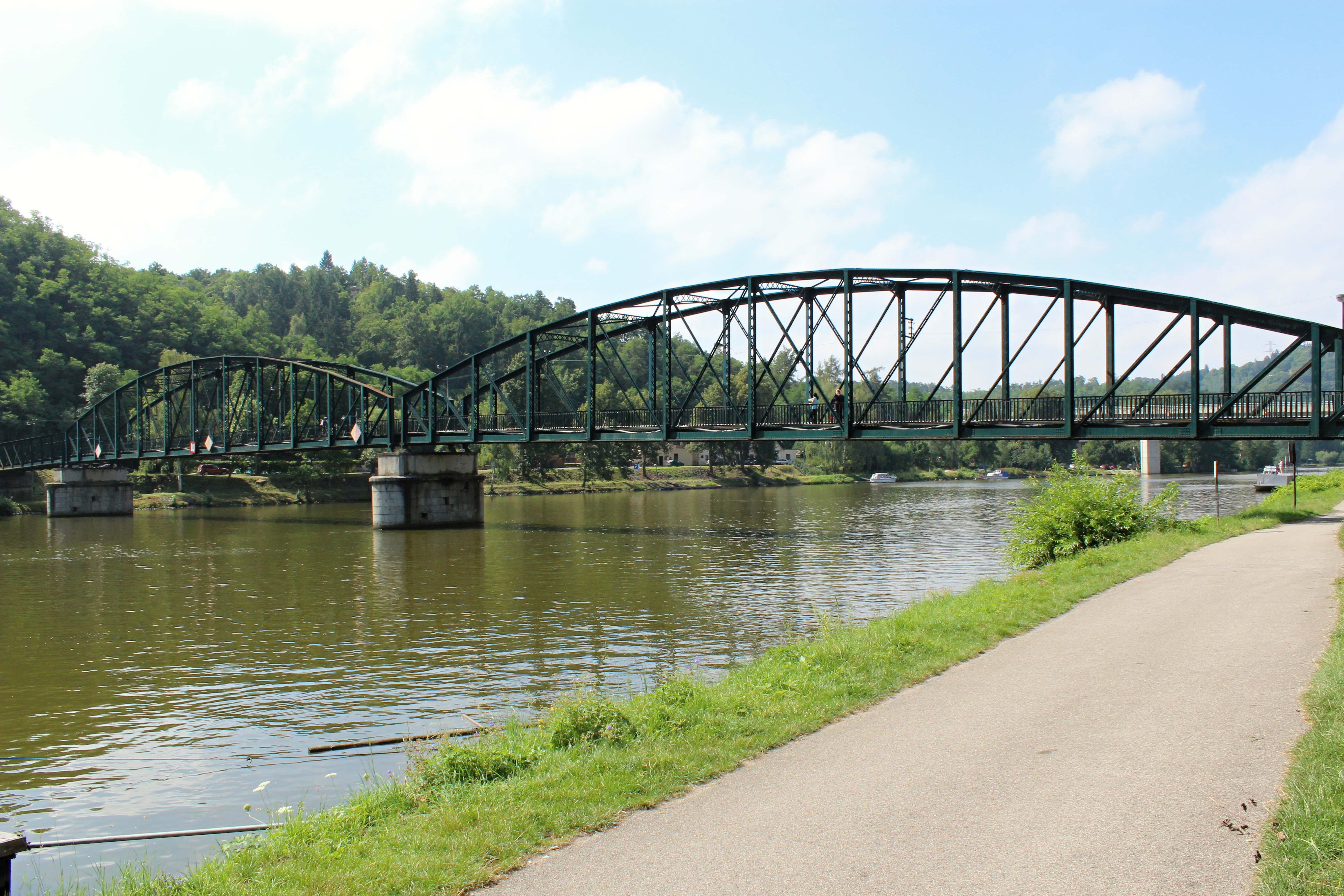 3.Starý davelský most pohled z davelského břehu proti proudu - s cestou